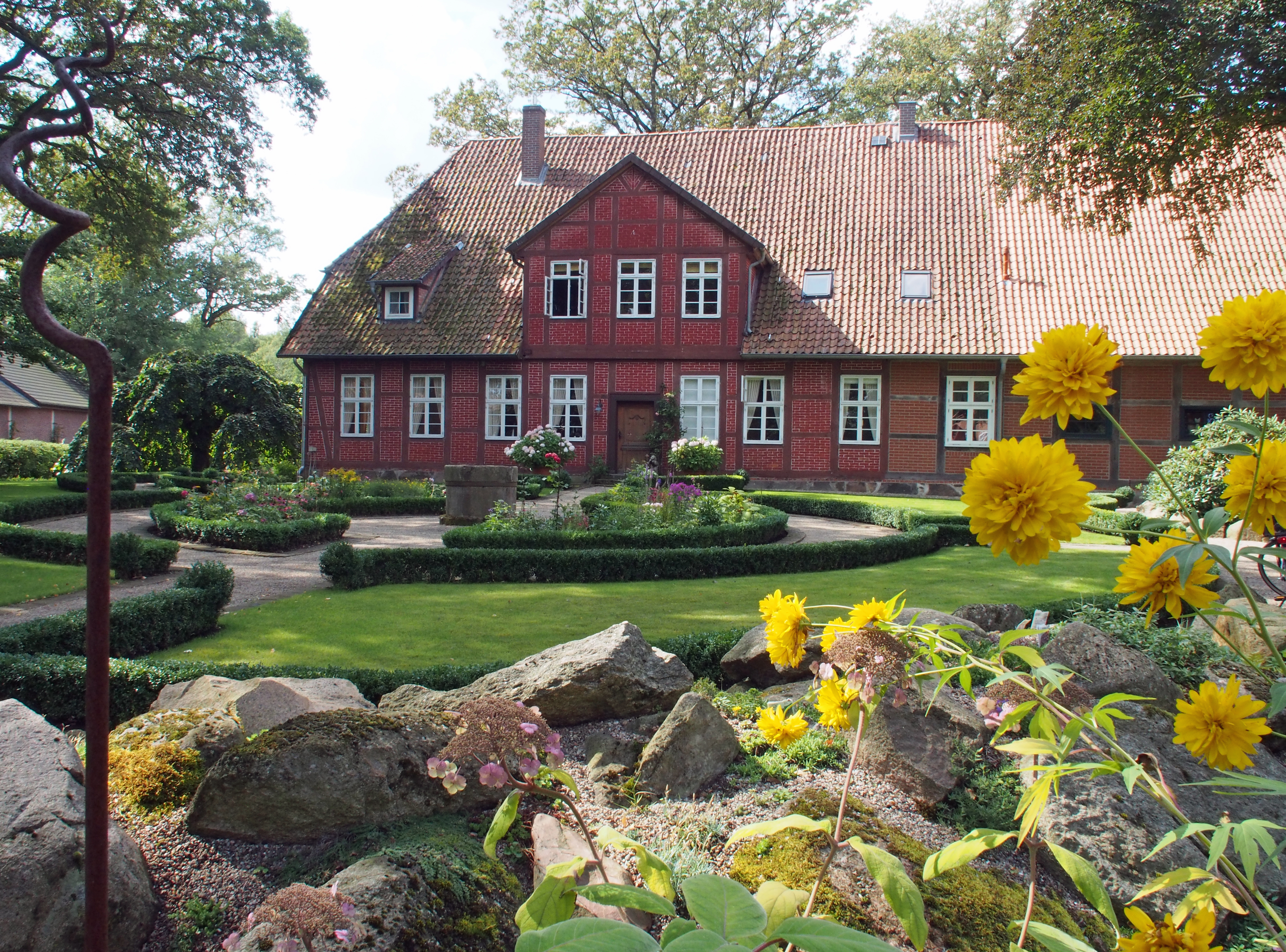 „Müllern-Hof“ in Müden (Örtze)